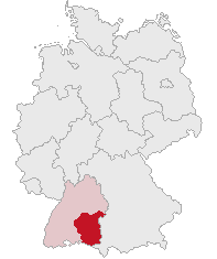 Regierungsbezirk Tübingen, Baden-Württemberg, Germany